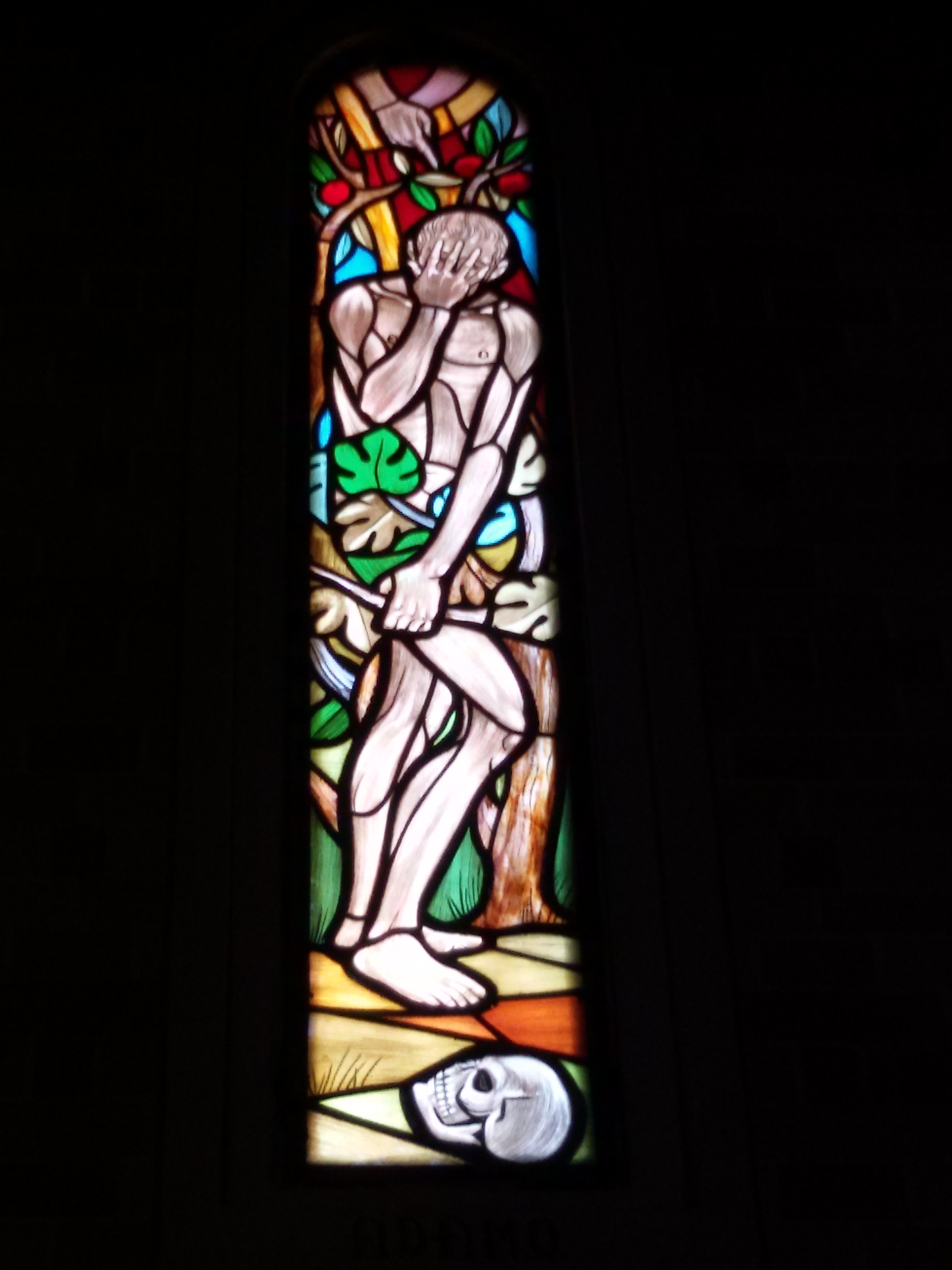 vetrata